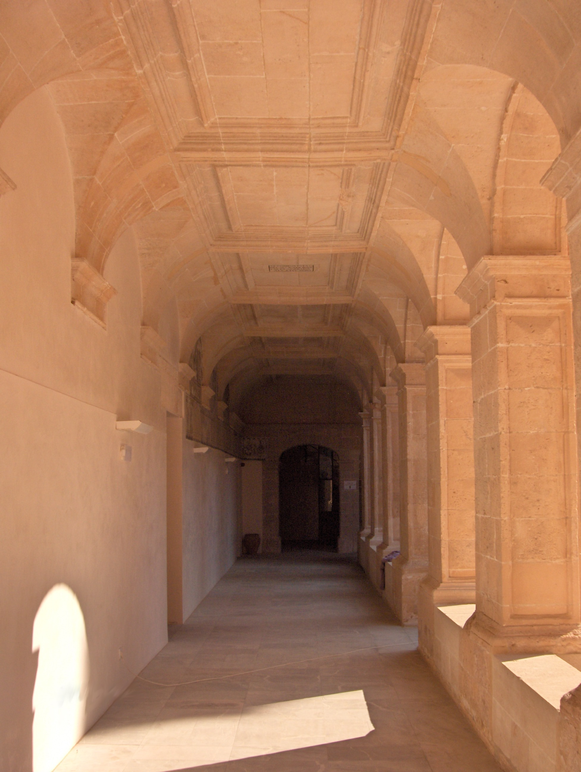 Galeria del Claustre del Convent franciscà de Sant Bonaventura de Llucmajor, Mallorca.